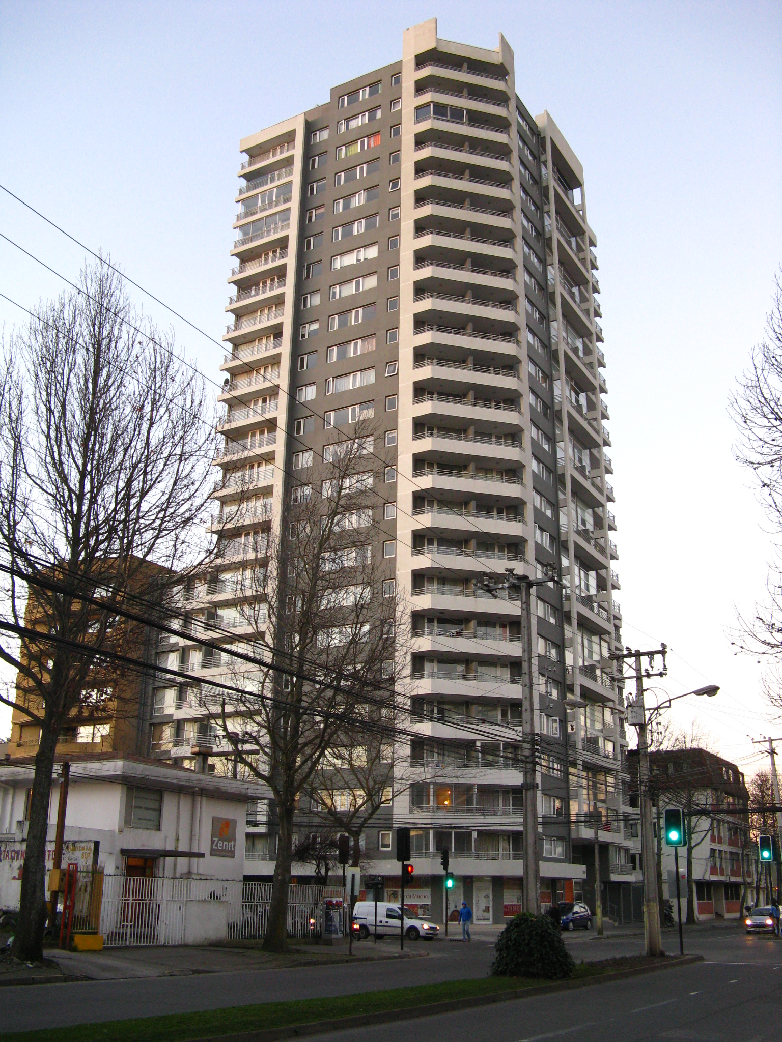 Torre City Concepción, Chile Julio de 2012